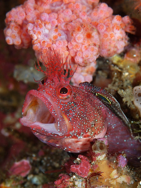 コケギンポ Neoclinus bryope